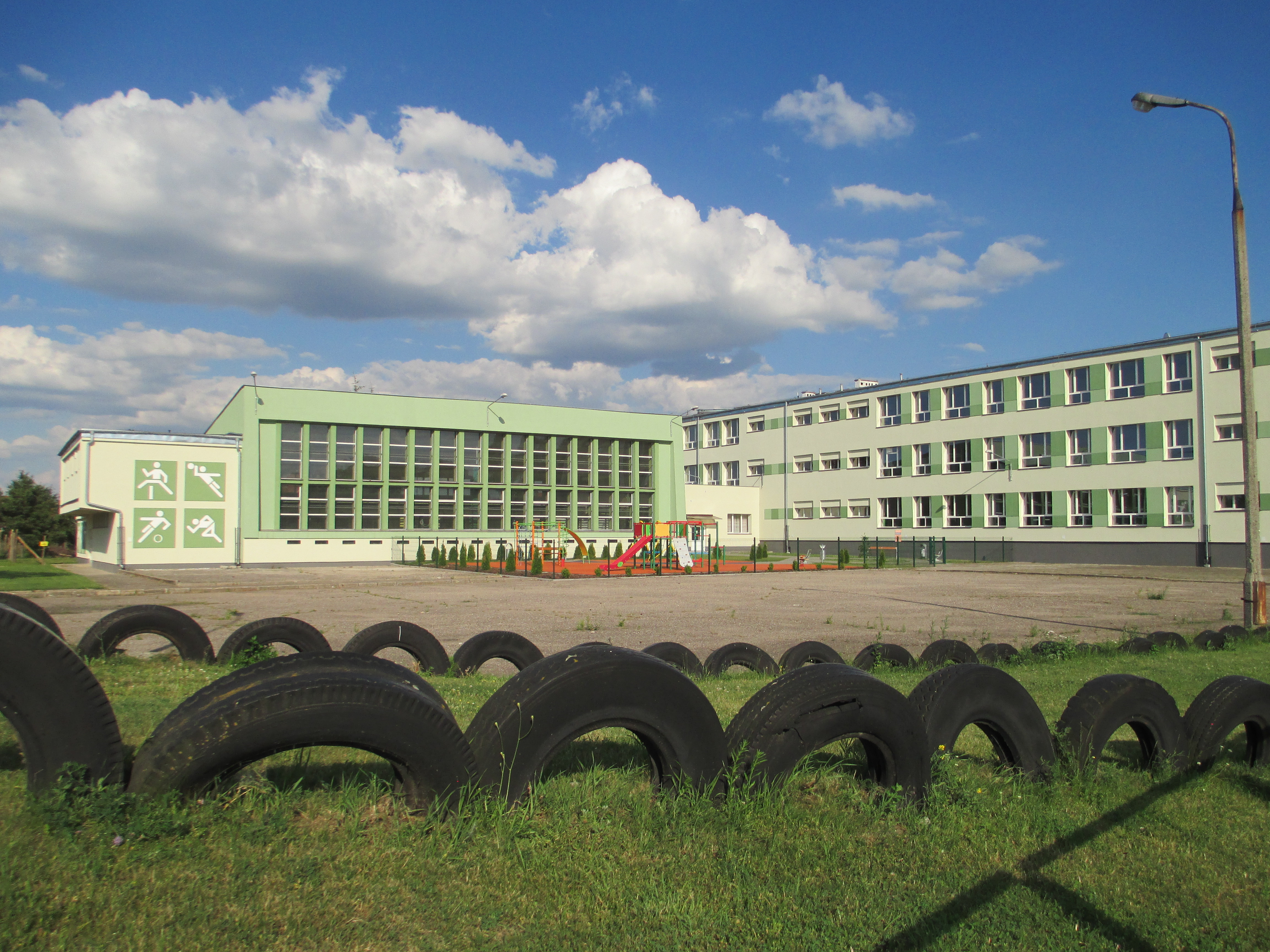 Zespół Szkół Samorządowych w Ełku